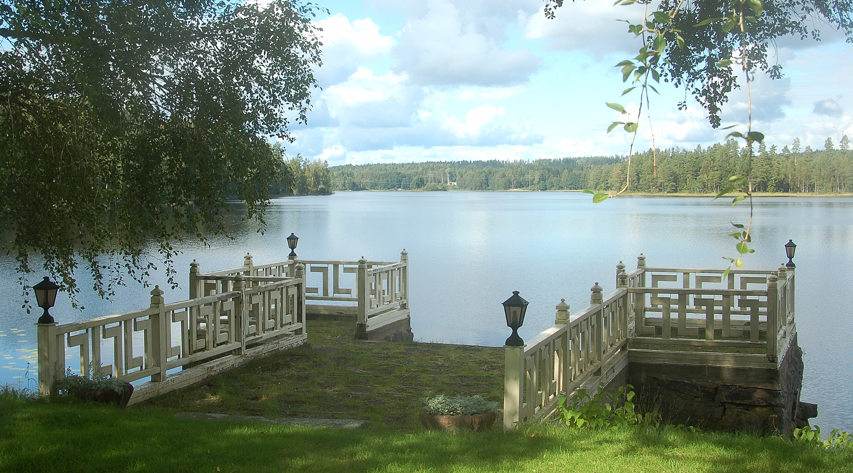 Lill Björken med altan vid Svartå Herrgård